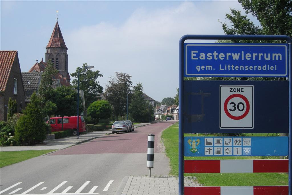 Oosterwierum